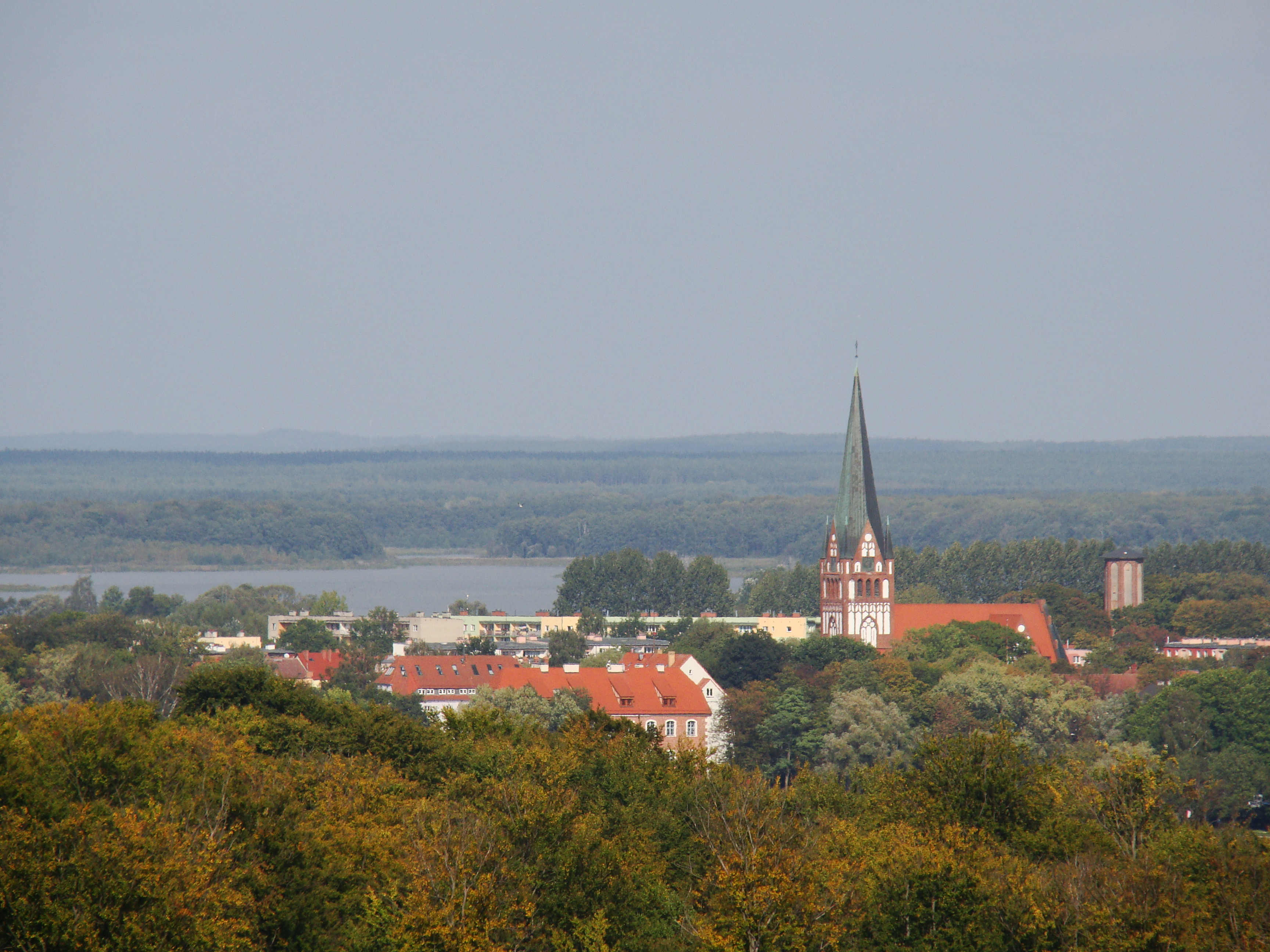 Szczecinek, zamek (skrzydło południowe), XV, 1690, XVIII, XX